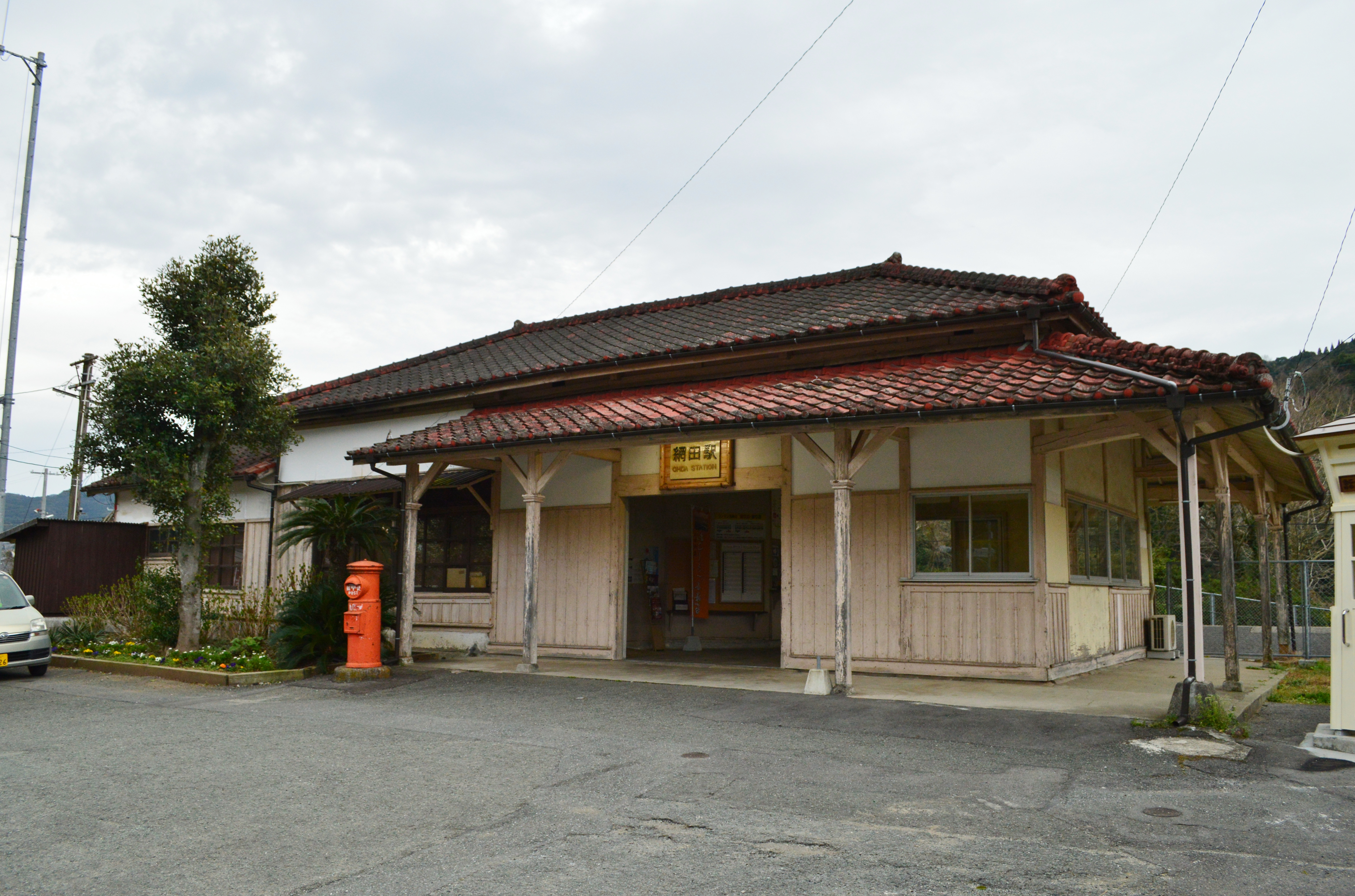 網田駅 駅舎